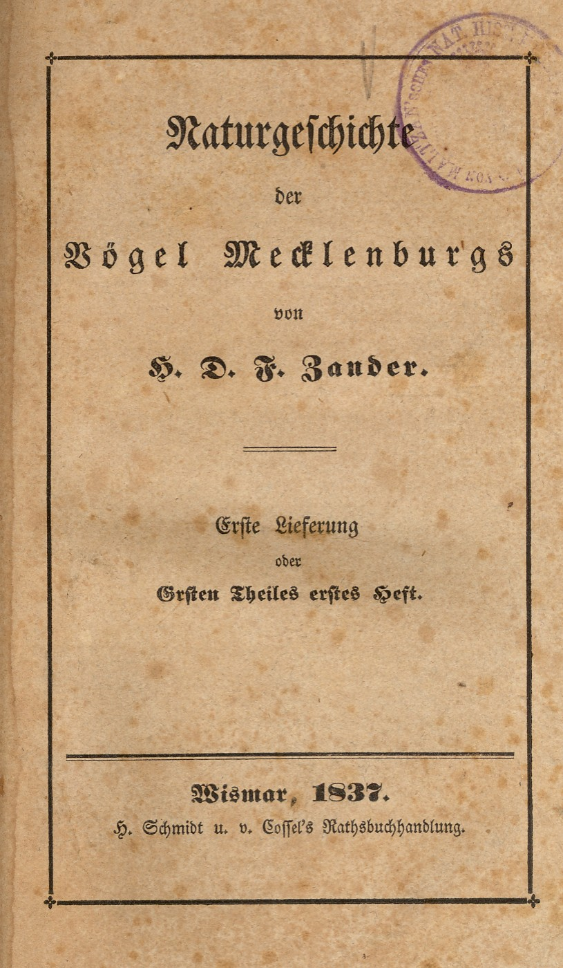 Titelblatt des Mecklenburgischen Vogelbuchs von Heinrich Zander